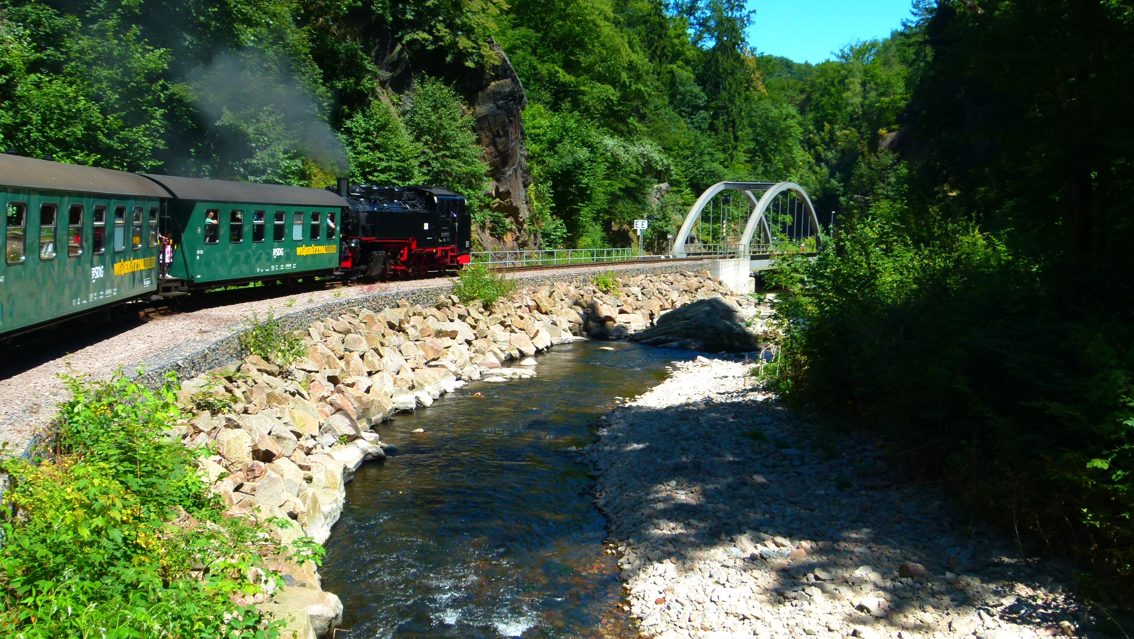 Denkmalgeschützte Sachgesamtheit Weißeritztalbahn